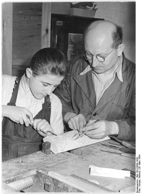 Zeulenroda, Möbelfabrik, Lehrling Zentralbild TBD-Schaar 29.3.1954 Für eine fortschrittliche Innenarchitektur Im VEB Ostthüringer Möbelwerke Zeulenroda sind die Kollegen dabei, den Ministerratsbeschluß über die neuen Aufgaben der Innenarchitektur und der Möbelindustrie vom 21.1.1954 mit allen Kräften zu verwirklichen. UBz: Unter Anleitung des erfahrenen Holzbildhauers Walter Schmidt macht die Arbeit des Lehrlings Joachim Förster gute Fortschritte.